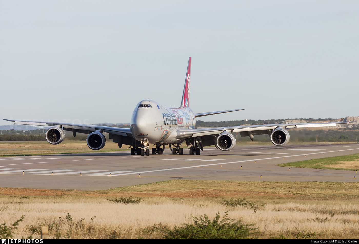 Boeing 747-8F da Cargolux após o pouso pela pista 13 no Aeroporto de Petrolina se encaminhando para realizar o backtrack na cabeceira oposta.